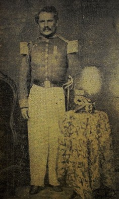 Ultima foto del general Rafael Carrera